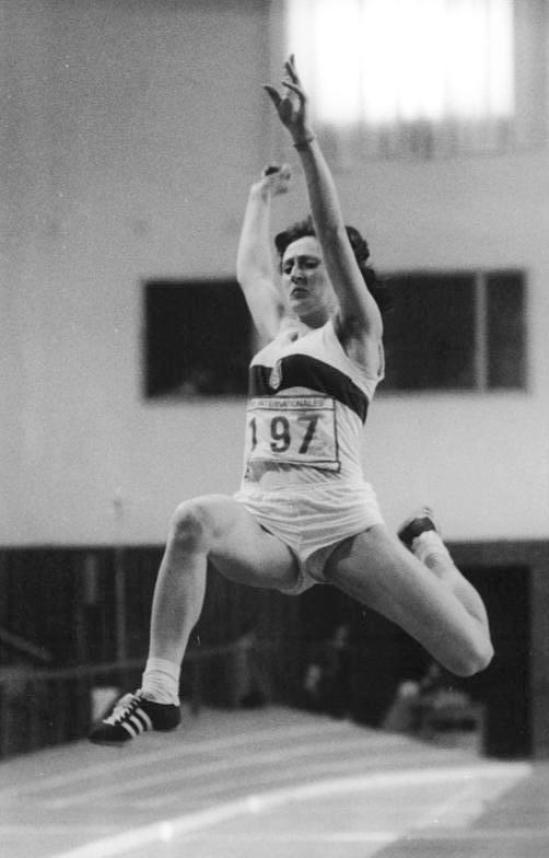 Heidemarie Wycisk ADN-ZB Mittelstädt 9.2.75-str-Berlin: Internationales Hallen-Leichtathletik-Sportfest des SC Dynamo. Siegerin der Weitsprungkonkurrenz wurde die Hallenserin Heidemarie Wycik (SC Chemie) mit einer Leistung von 6,28 m.